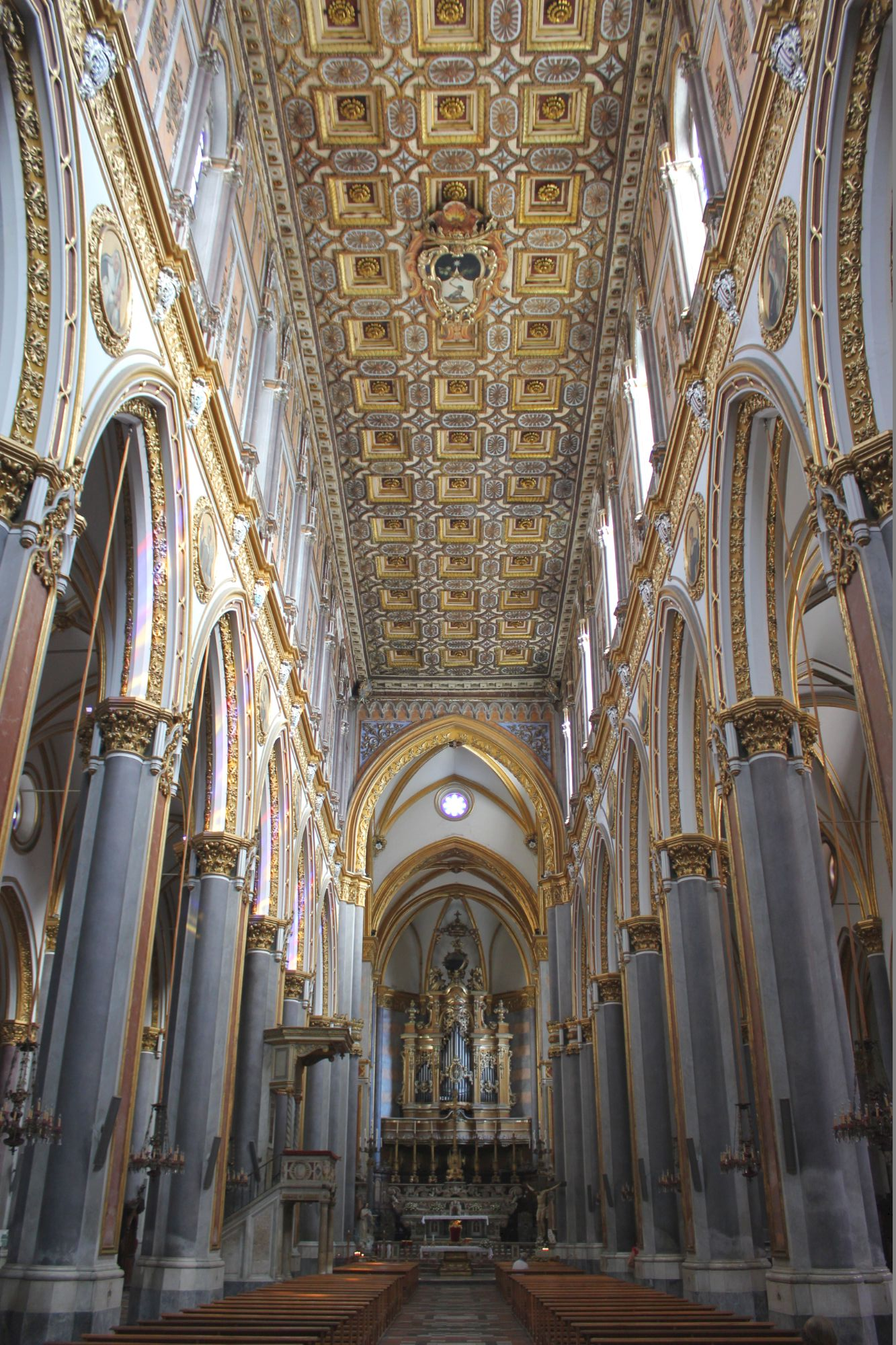 Nápoles. San Domenico Maggiore. Interior.